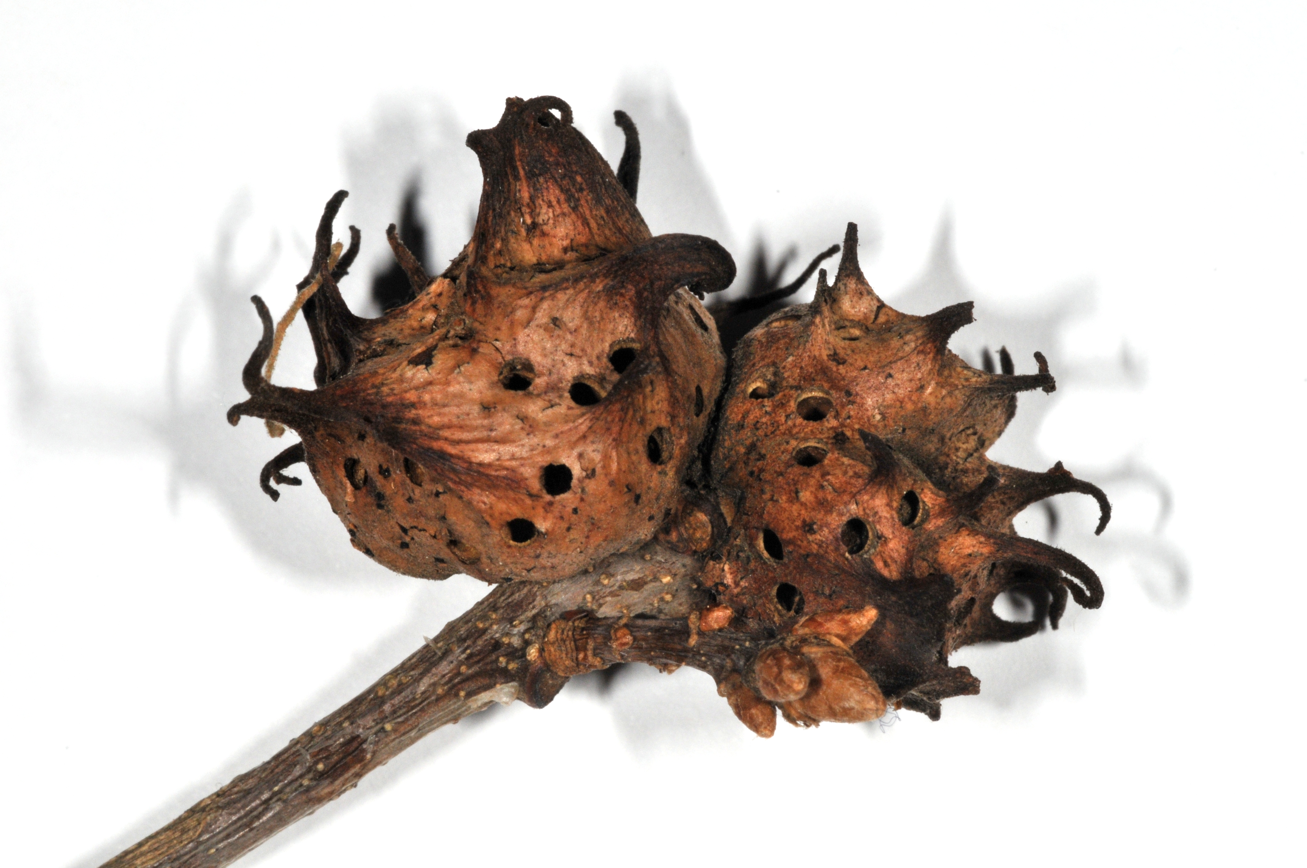 Andricus coriarius Galle an Quercus cerris, Wiesbaden, Hessen, Deutschland. leg. G. Schadewaldt